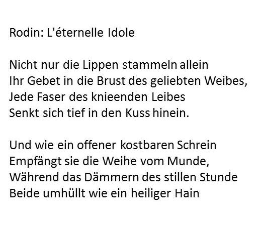 Alfred Kastler' Gedicht